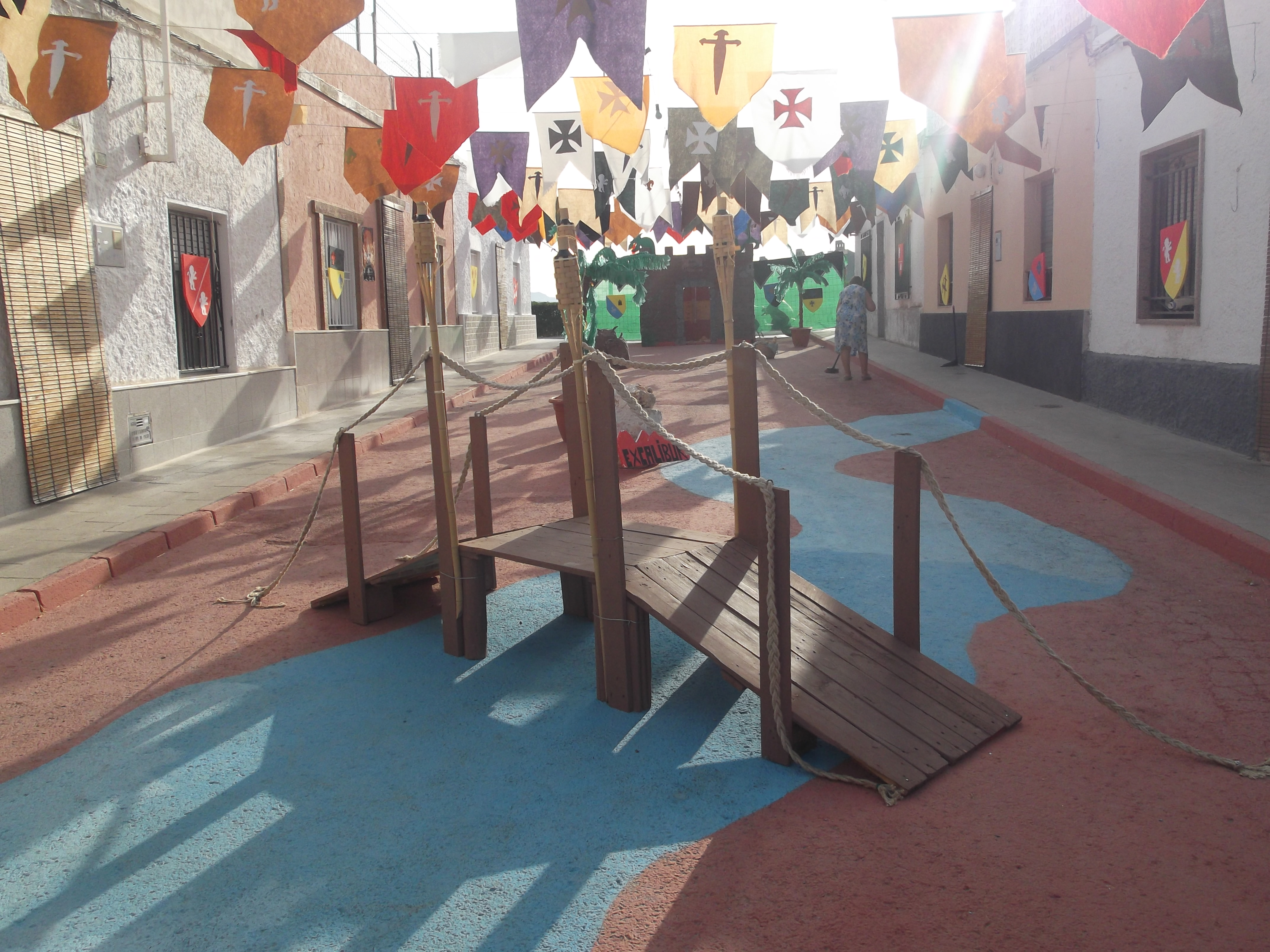 Calle San Fernando, ganadora del concurso de engalanamiento de calles en las Fiestas Patronales de 2012.